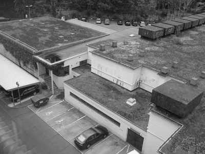 Bunker der Reichsbahn in Berlin-Kreuzberg am Halleschen Ufer